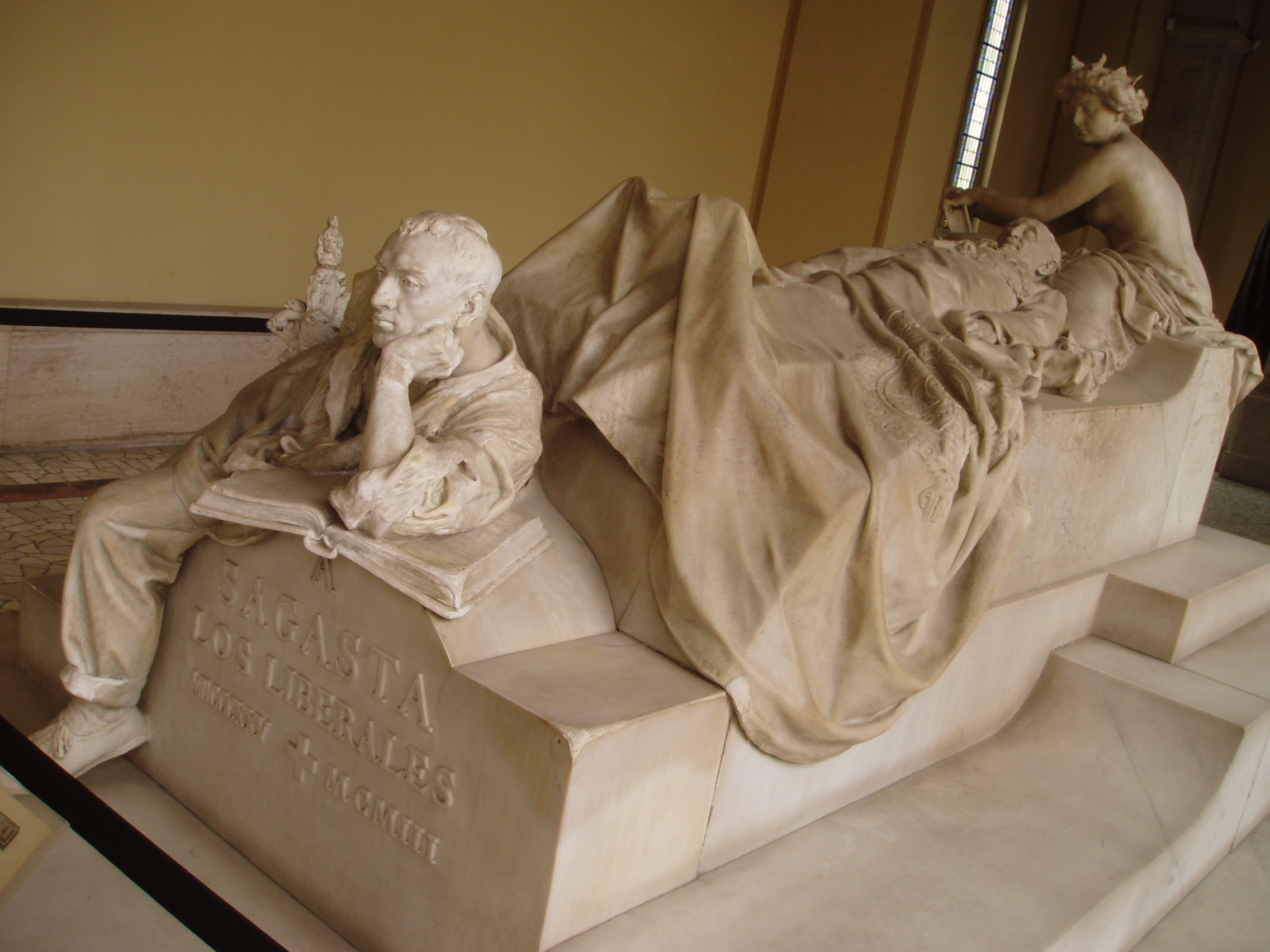 Sagasta. Panteón de Hombres Ilustres. Madrid. España.